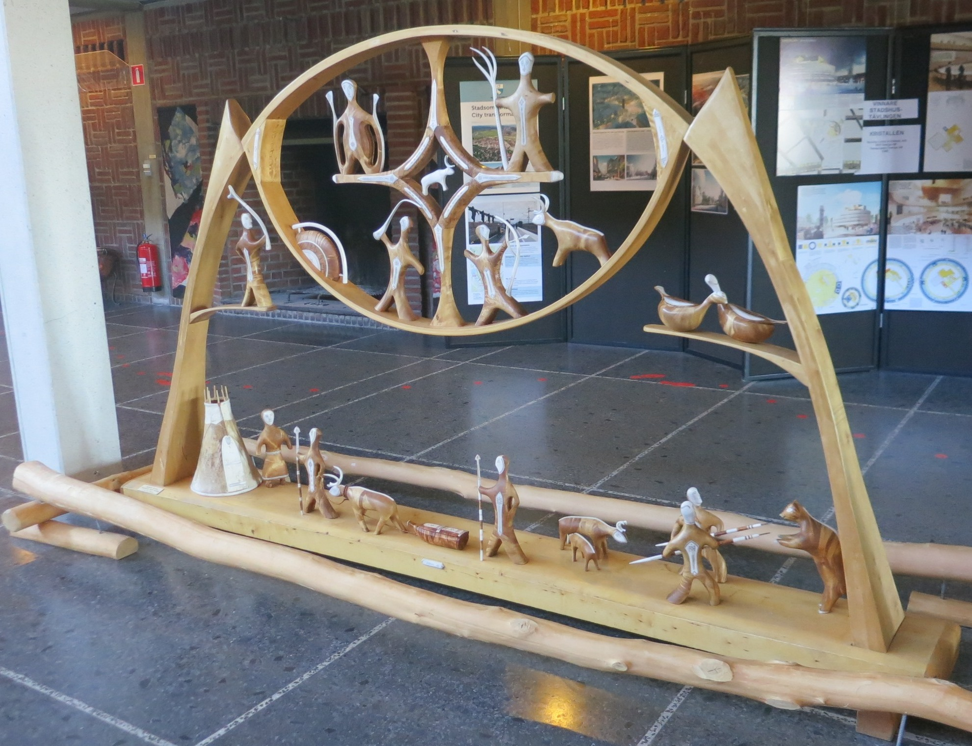 Konstverk Kiruna Stadshus